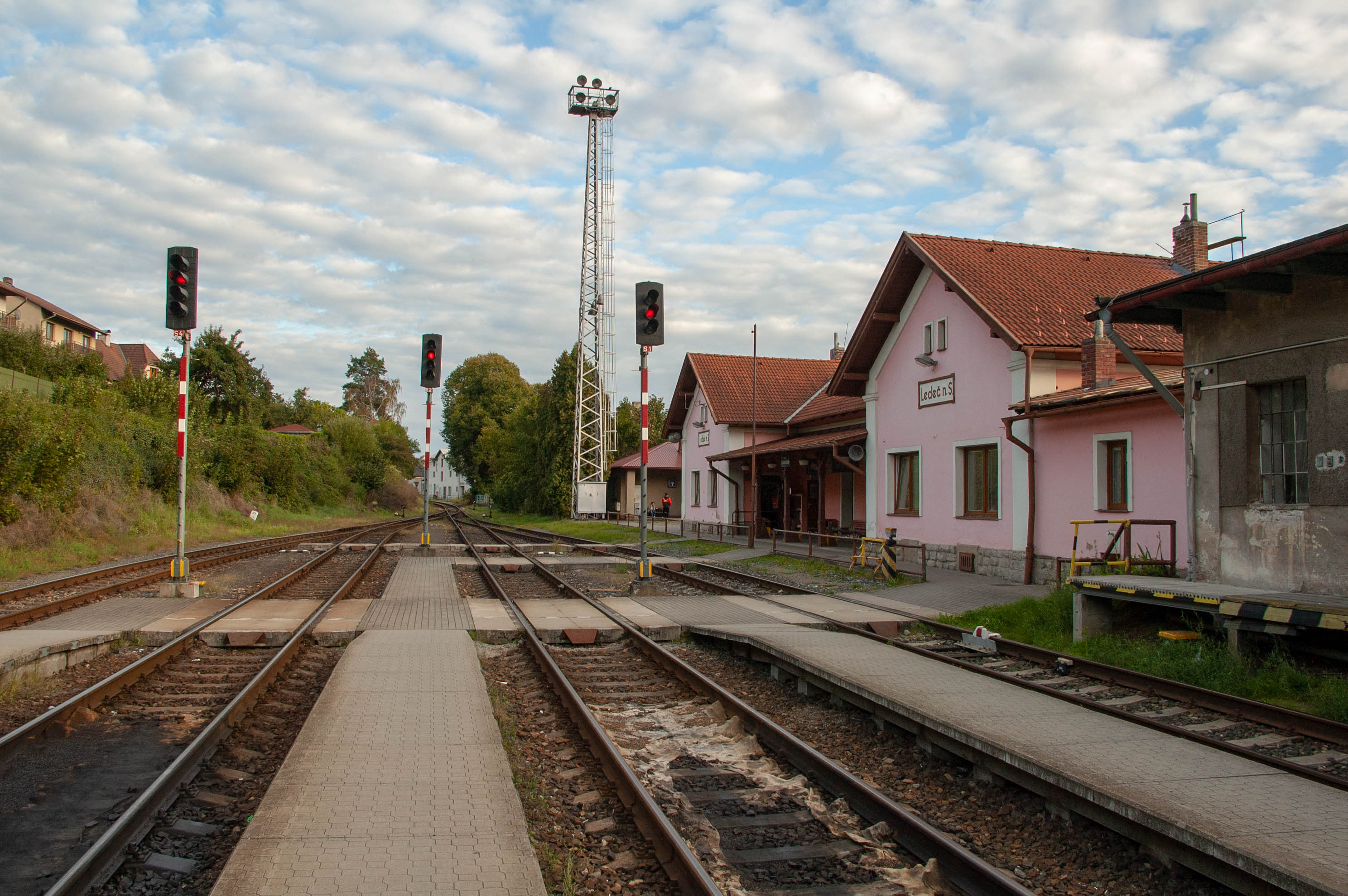 Nádraží v Ledči nad Sázavou – staniční budova z nástupiště